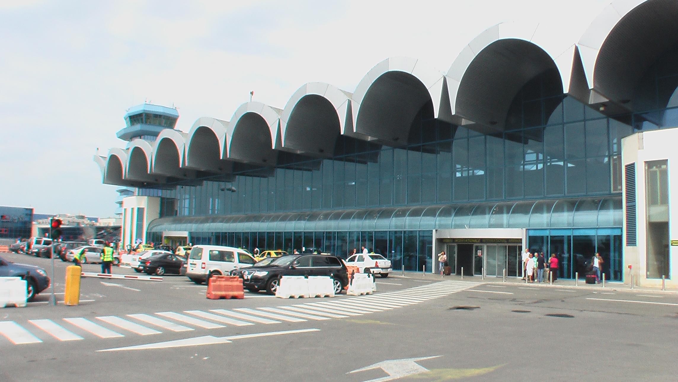 ClujNapocaFlughafen